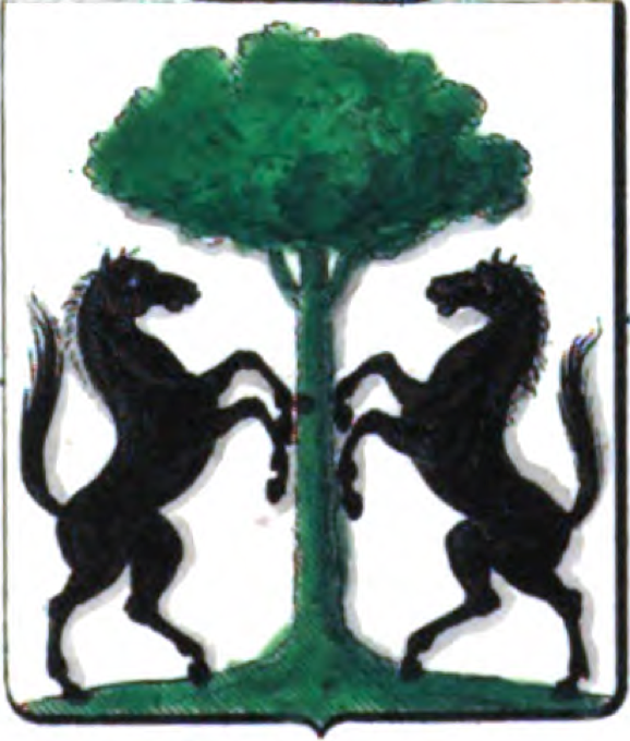 D'argent, à l'arbre de sinople, accompagné de deux chevaux affrontés de sable.